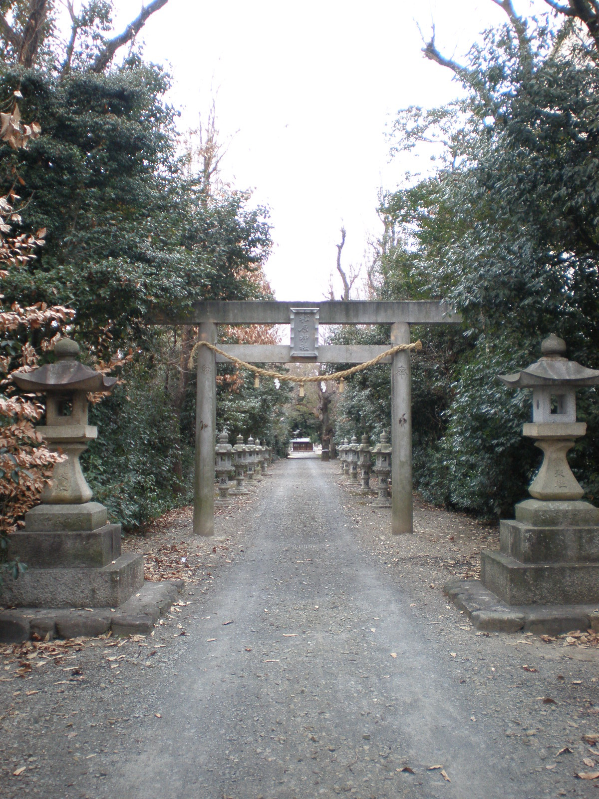 愛知県春日井市にある松原神社の鳥居